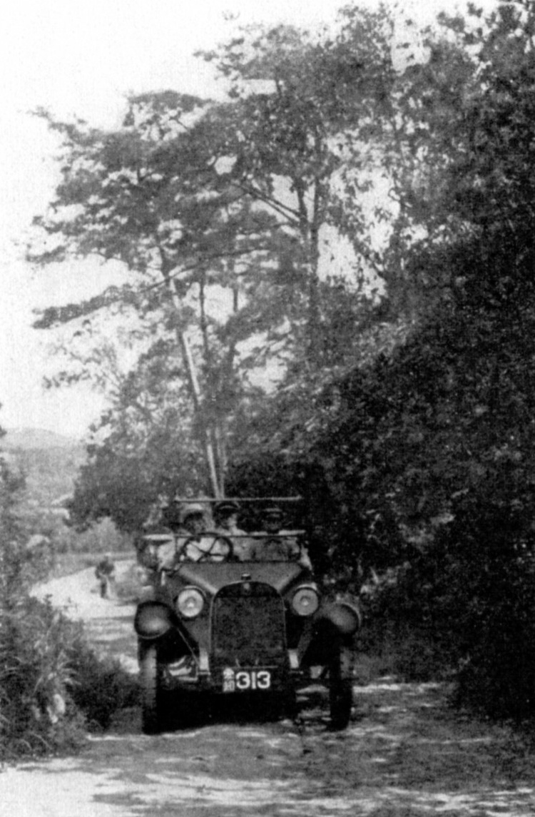 尾三自動車初期のバス